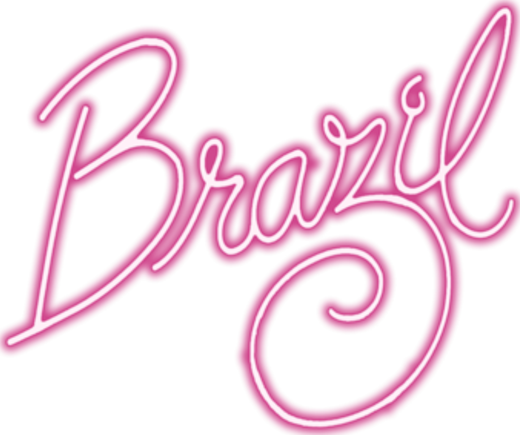 "Brazil" movie logo